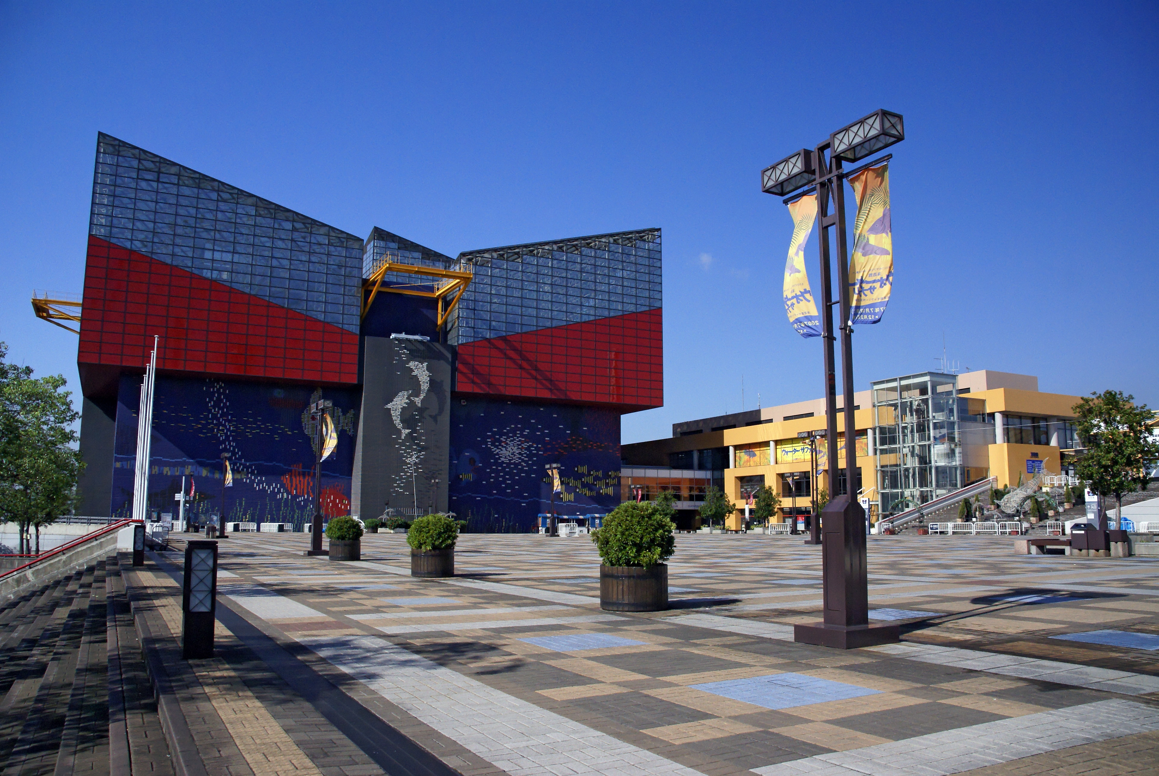 Osaka Aquarium KAIYUKAN (Ring of Fire Aquarium) in Osaka, Osaka prefecture, Japan